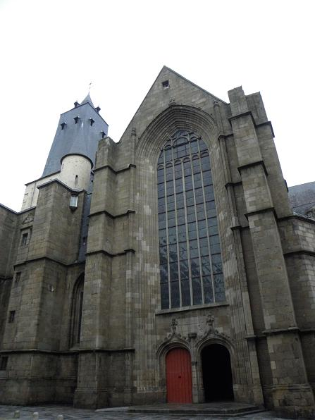 Façade occidentale de l'église Saint-Germain de Rennes (35).